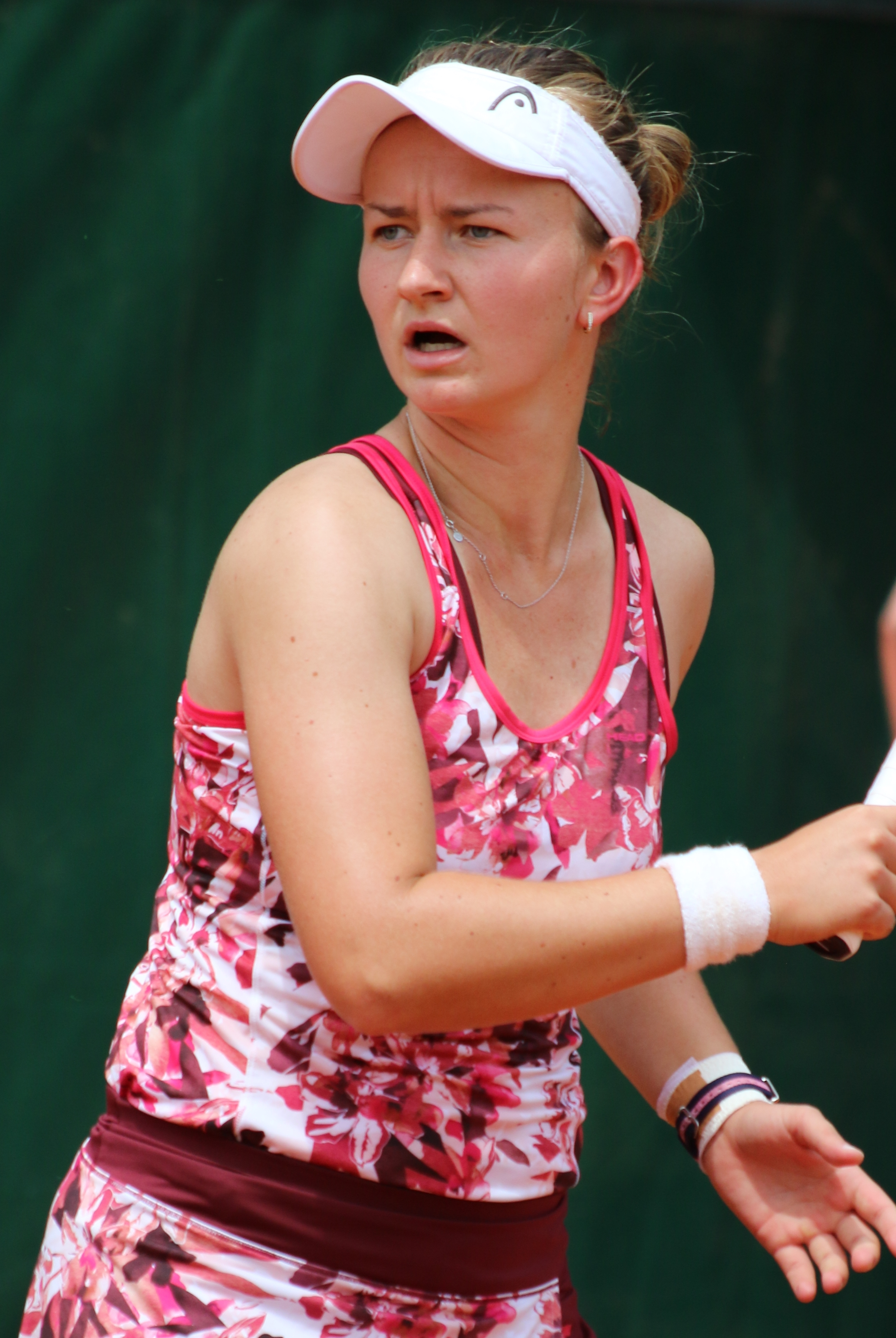 Krejcikova RG18 (7)